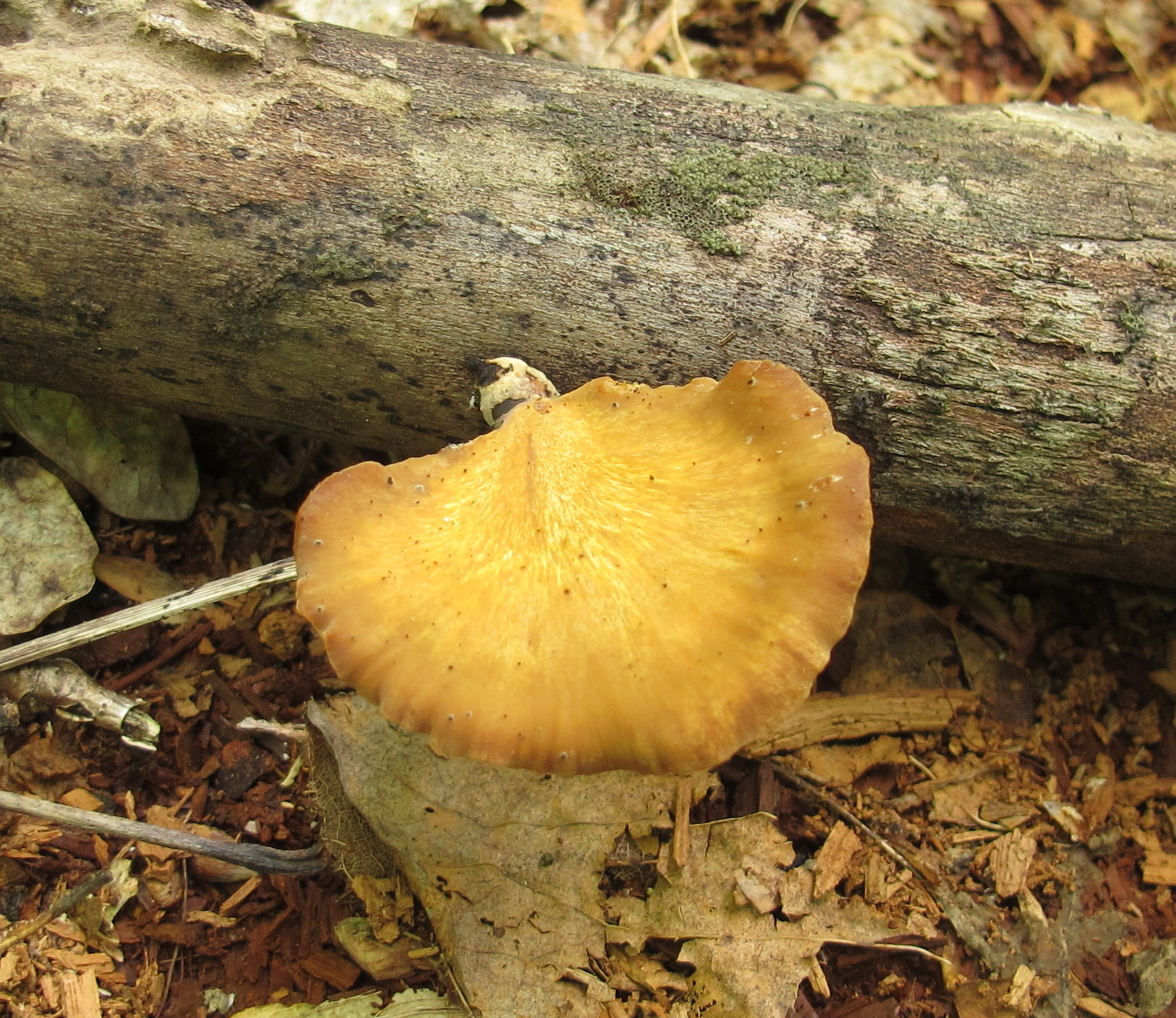 Polyporus leptocephalus (Jacq.) Fr.